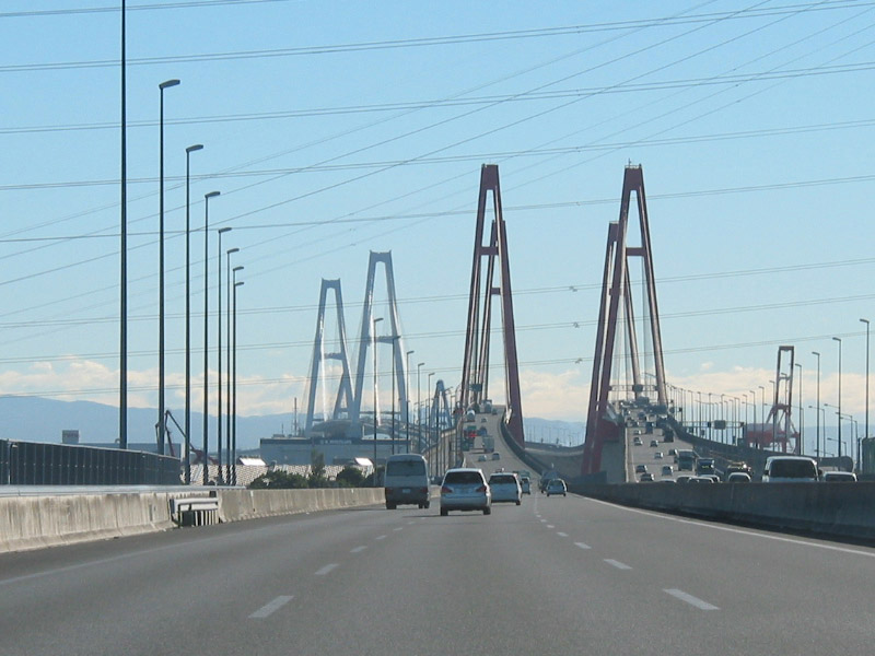 愛知県名古屋市の名古屋港を渡る伊勢湾岸自動車道名港西大橋・中央大橋・東大橋を西大橋西詰より撮影。2006/10/07 投稿者が撮影 Category:橋画像 Category:港区_(名古屋市)の画像 Category:飛島村の画像